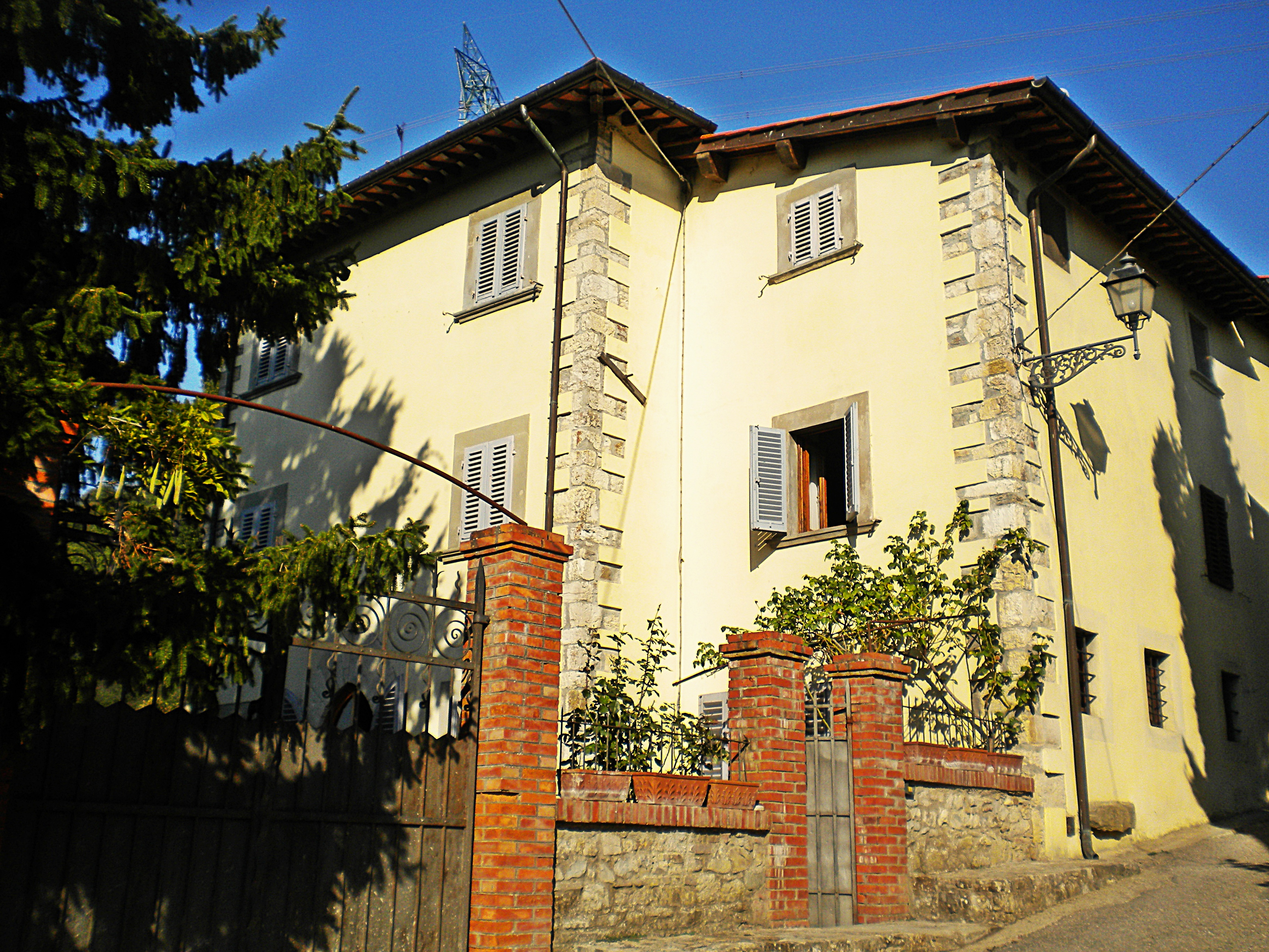 Villa Buonamici